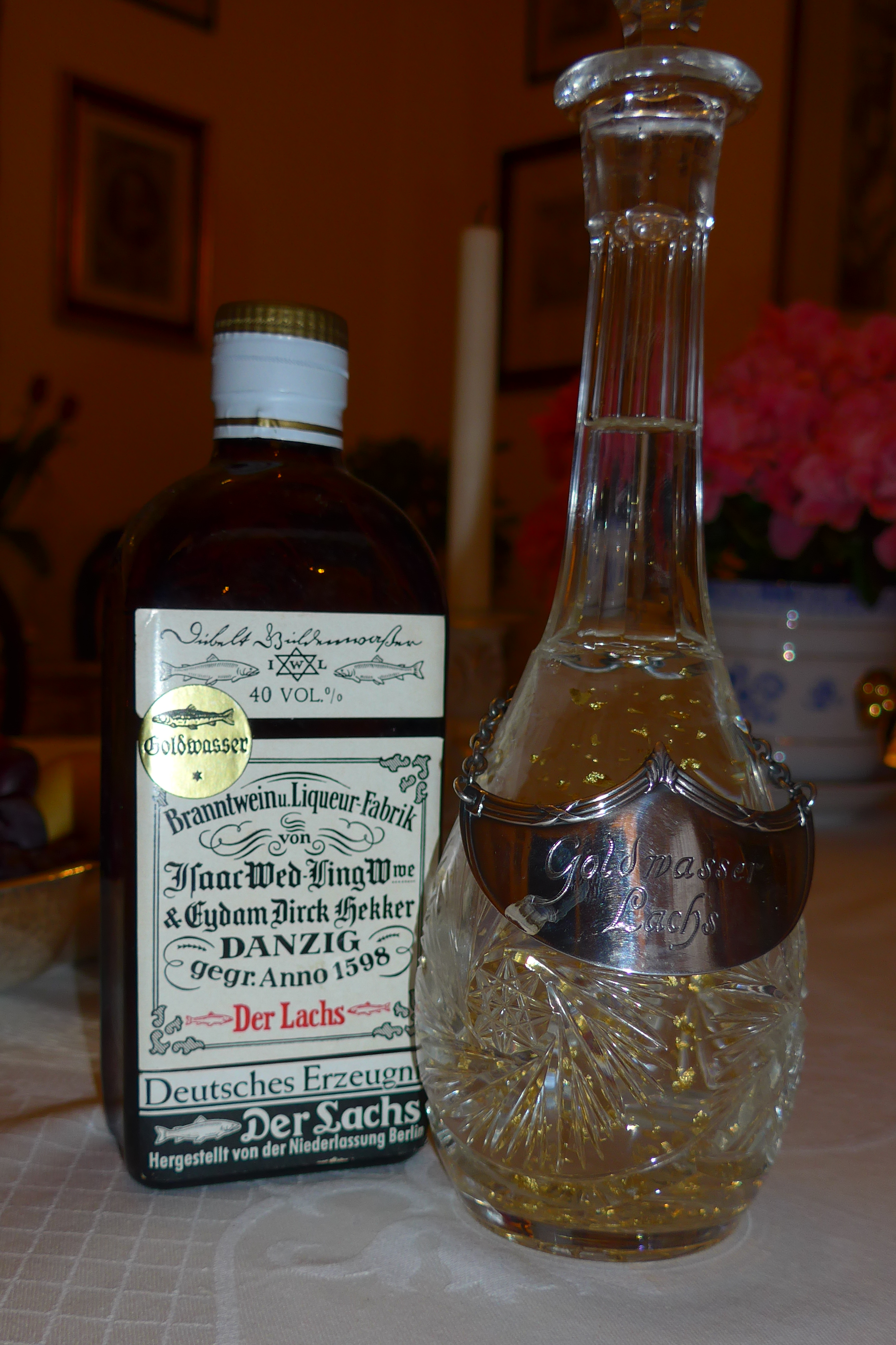 Originalflasche Danziger Goldwasser (um 1950) Karaffe gefüllt mit Danziger Goldwasser, passendes Karaffen- Schildchen